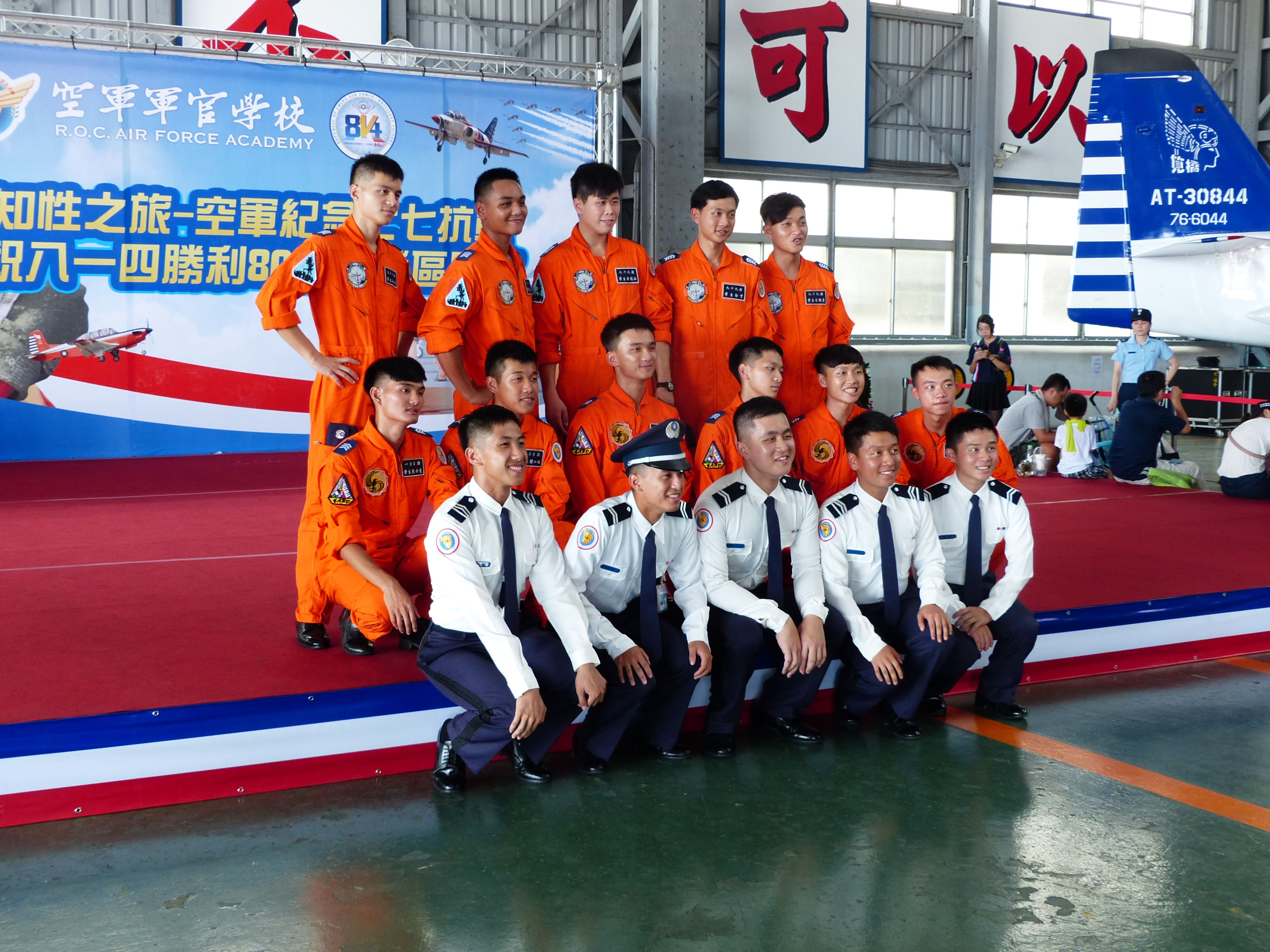 2017年空軍岡山基地營區開放活動中午，空軍官校飛行軍官班（前列）與正期學生班（後方）學生在機棚展示區的紀念合影。